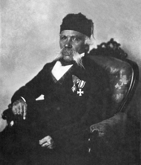 Вук Стефановић Караџић (1787-1864). Анастас Јовановић. фотографија. око 1850.